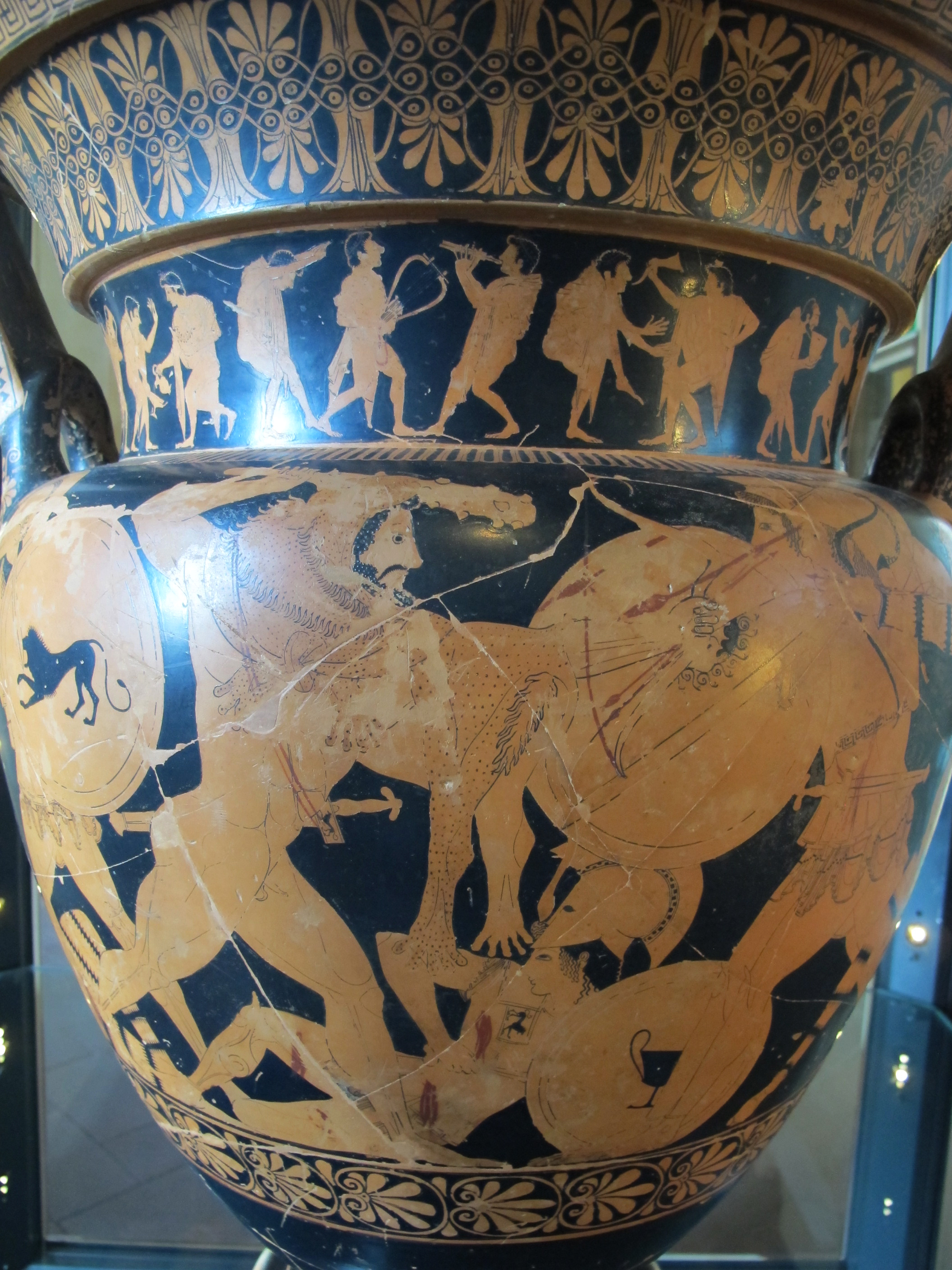 Museo Archeologico Nazionale G.C.Mecenate - MIBAC This is a photo of a monument which is part of cultural heritage of Italy.